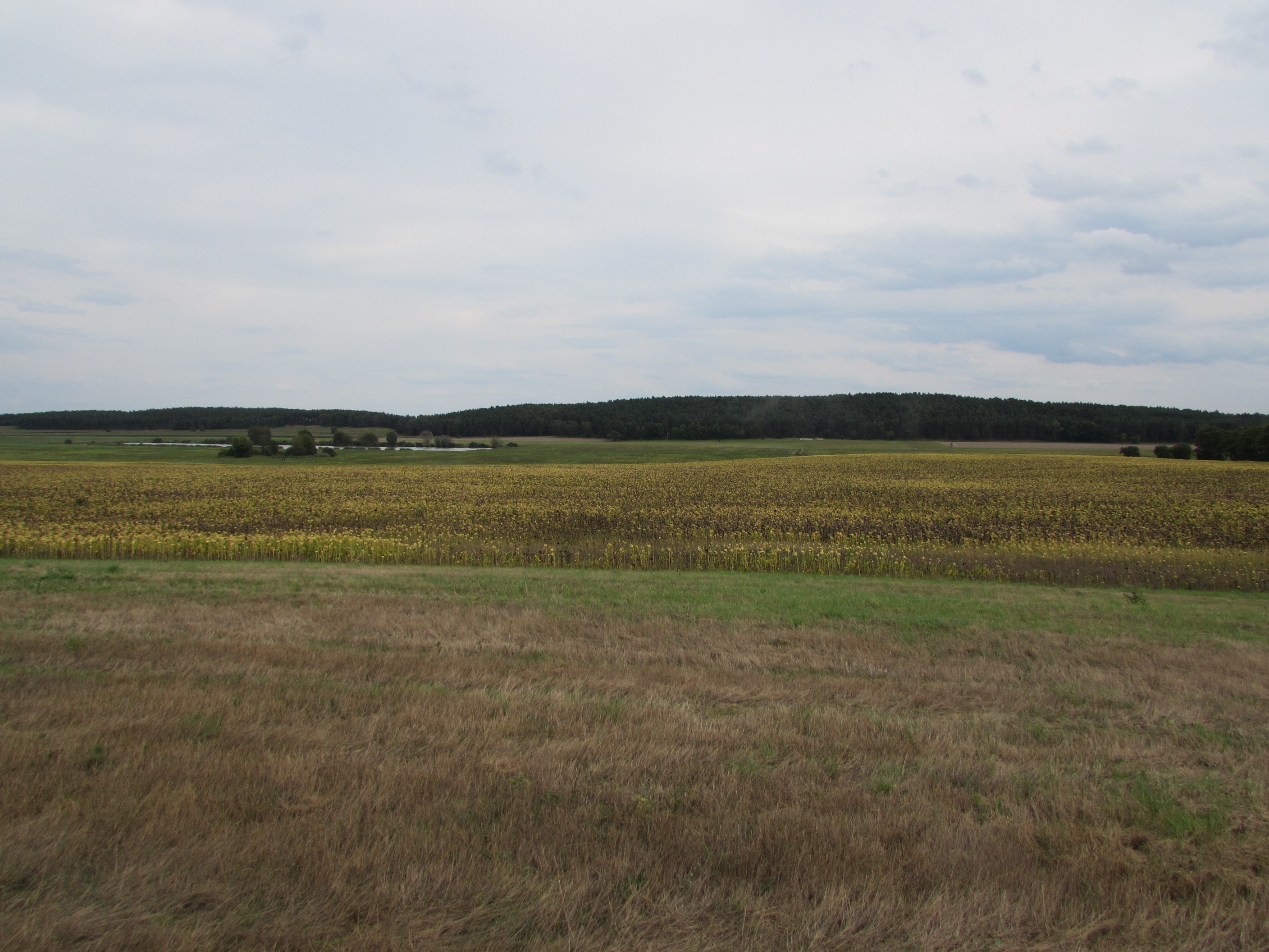 vorcdergrund marzahner fenn, hintergrund eichberg und fichtenberg in gemeinde beetzsee